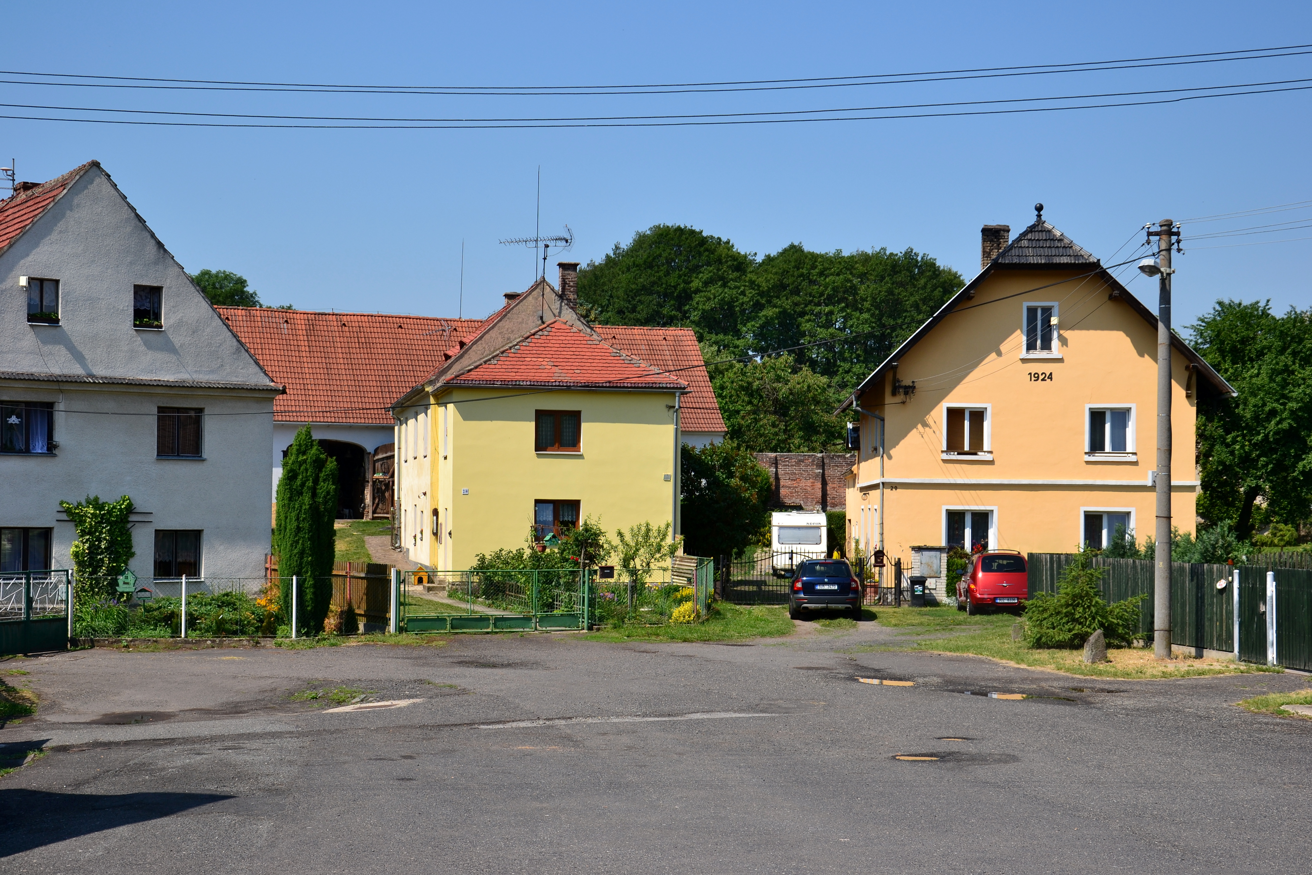 Chvalov – náves